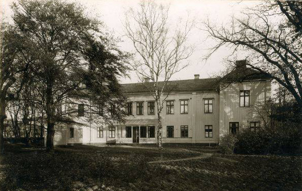 Gubbero mansion